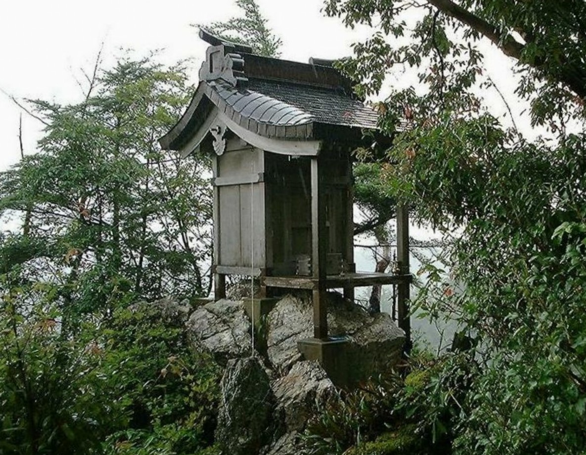 太龍寺の北捨心ヶ嶽